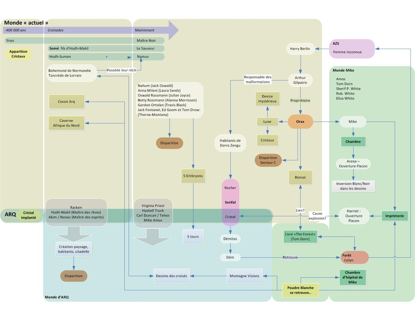 Schéma résumant les principales interactions des 15 premiers tomes